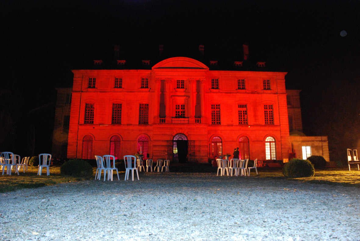 Le château de Montgobert éclairé en rouge lors d'une soirée cet été (2009)